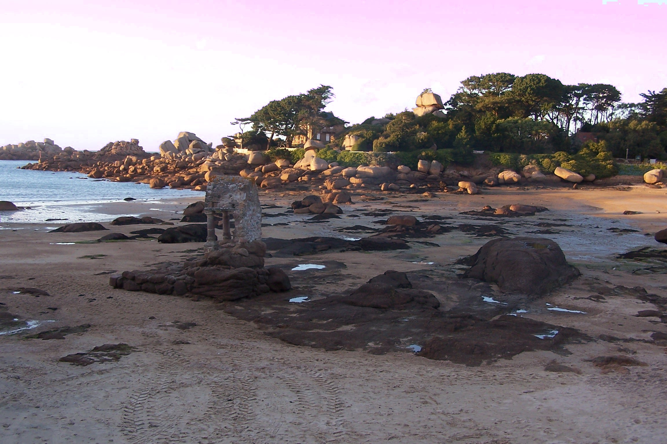 Perros-Guirec Ploumanac'h Plage Saint-Guirec